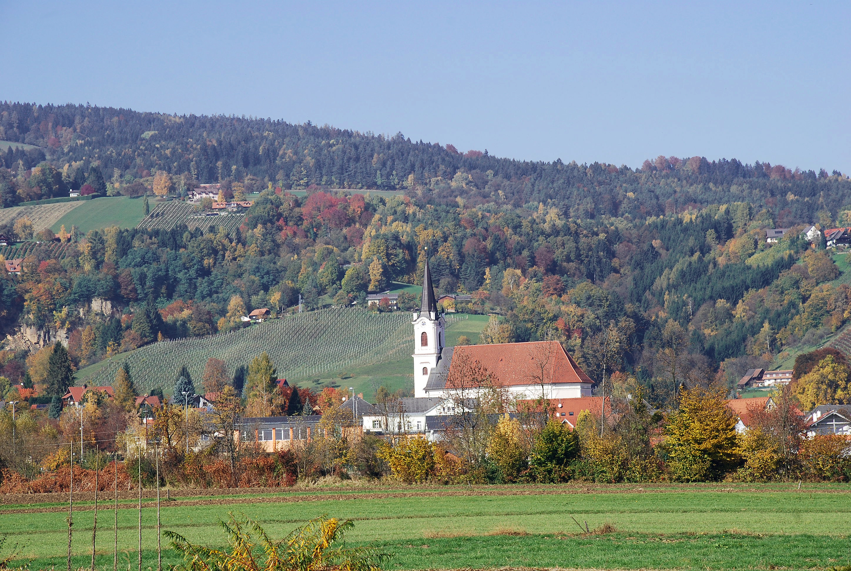 Pfarrkirche Bad Gams, Steiermark, Österreich, Südseite der Kirche Object location46° 52′ 10.96″ N, 15° 13′ 21.04″ E